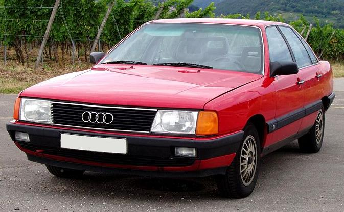 Audi 100 C3, 66 kW, Baujahr 1987, Typ 44 Fotograf: Benutzer:Preiselbeere